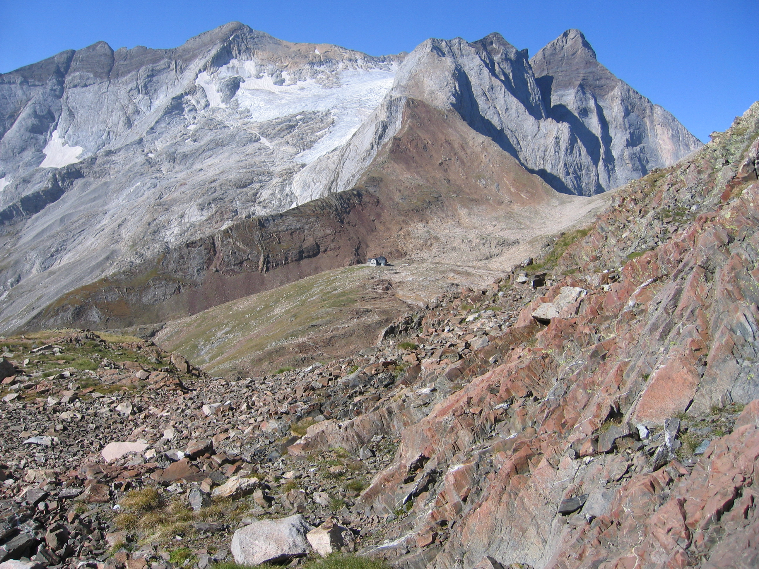 Refuge Bayssellance (2 651 m) et petit Vignemale (3032 m), col de Hourquette à droite (2 734 m), vue partielle du glacier d'accès au Vignemale (3 298 m). La photo est prise du col de Labas (entre le pic de Labas et le pic de la Sède)